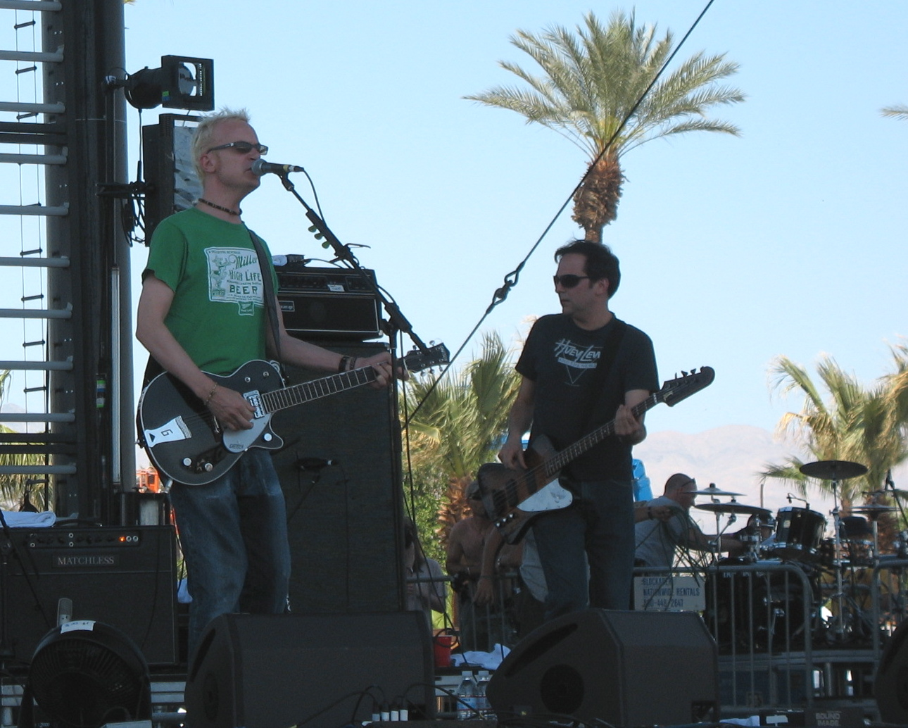 Live outside